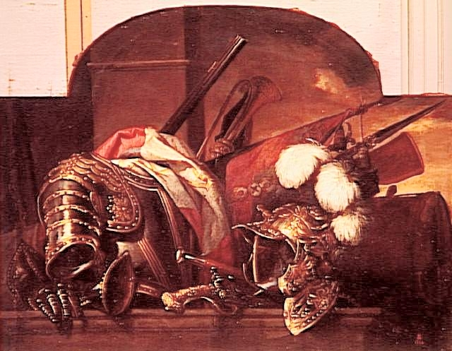 TROPHEES D'ARMES ET INSTRUMENTS MILITAIRES ; Salon : Antichambre de la reine, Grands appartements du Château de Versailles Emplacement : dessus-de-port